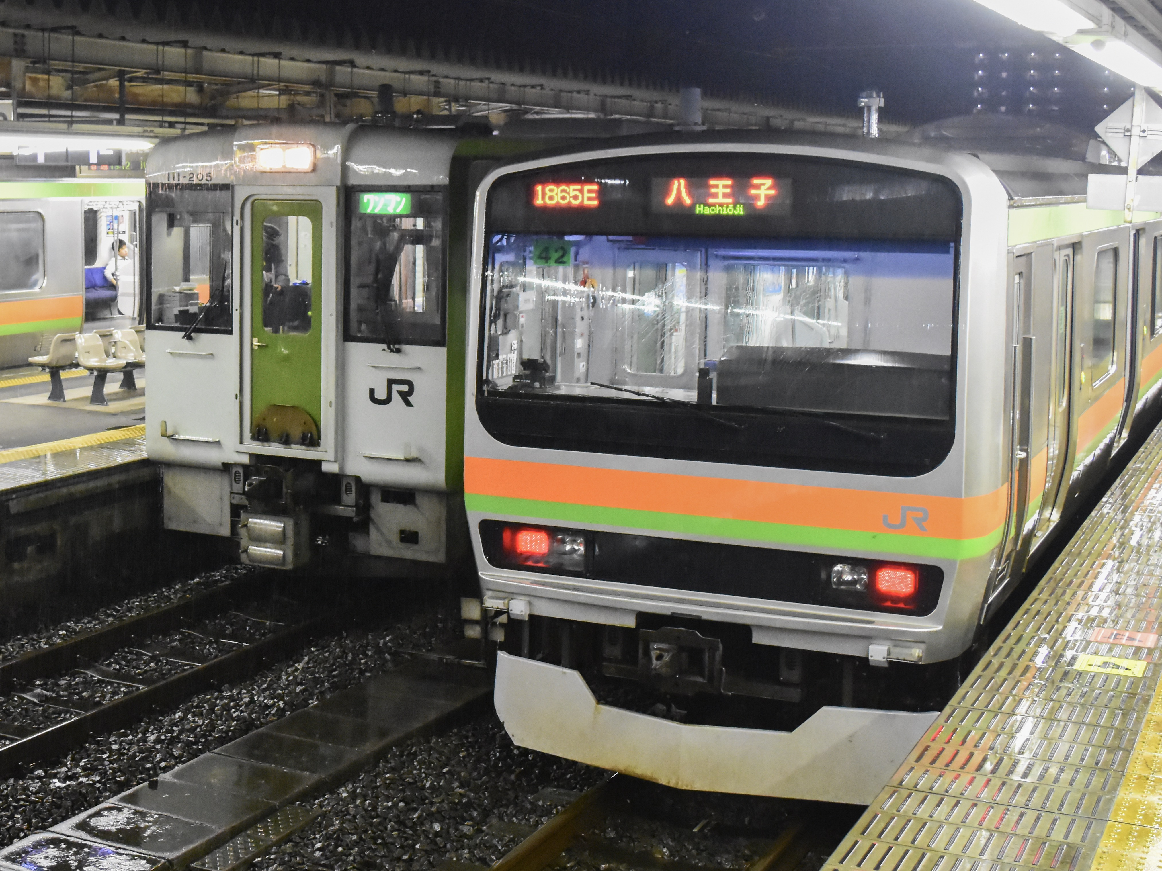 八高線高麗川駅にて 2018.9.30 キハ110系気動車とE231系3000番台電車